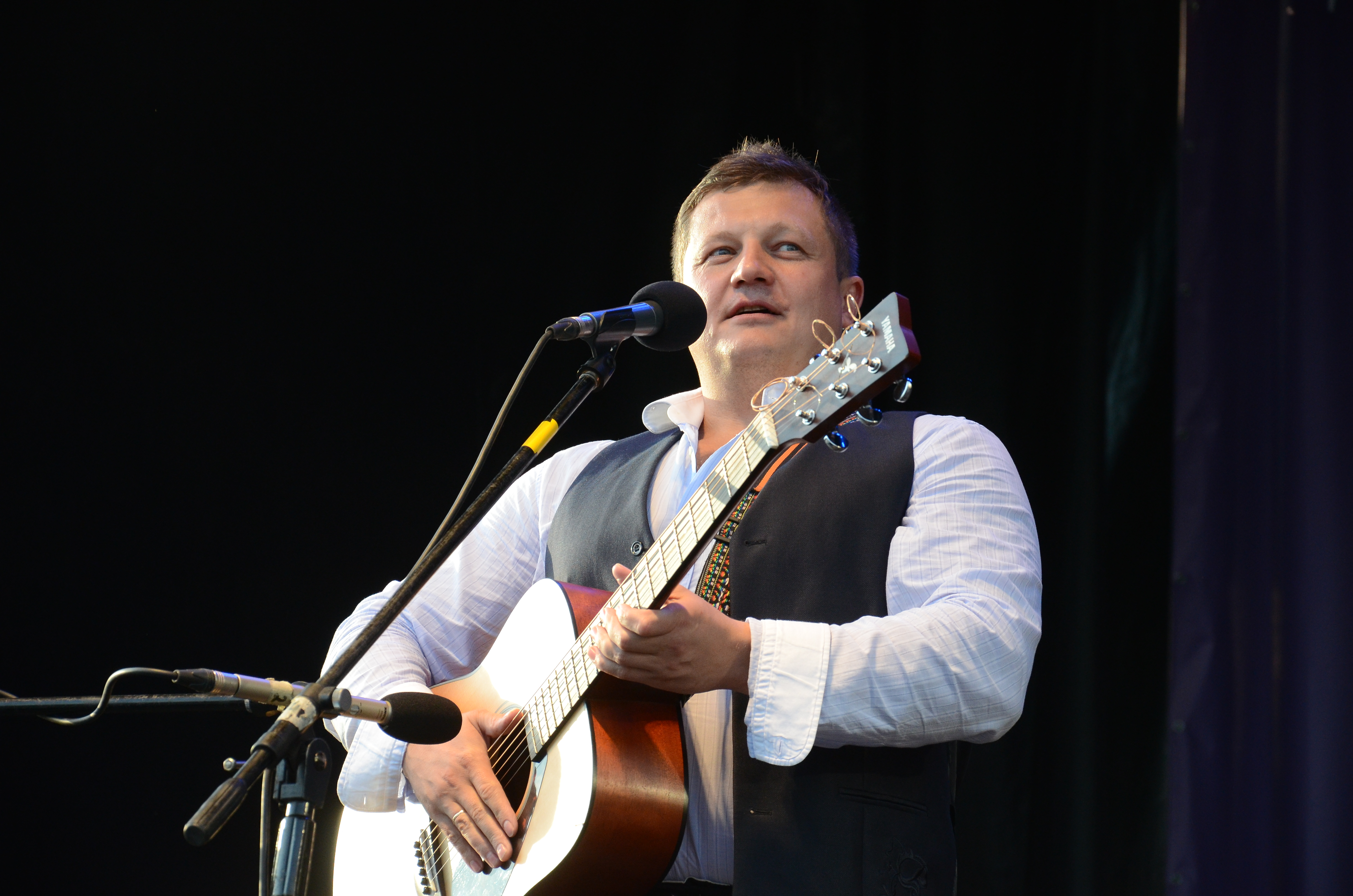 Павел Усанов на фестивале «Большой Донбасс»